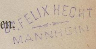 Besitzstempel von Dr. Felix Hecht, Mannheim in einem Exemplar aus dem Bestand der Württembergischen Landesbibliothek Stuttgart.